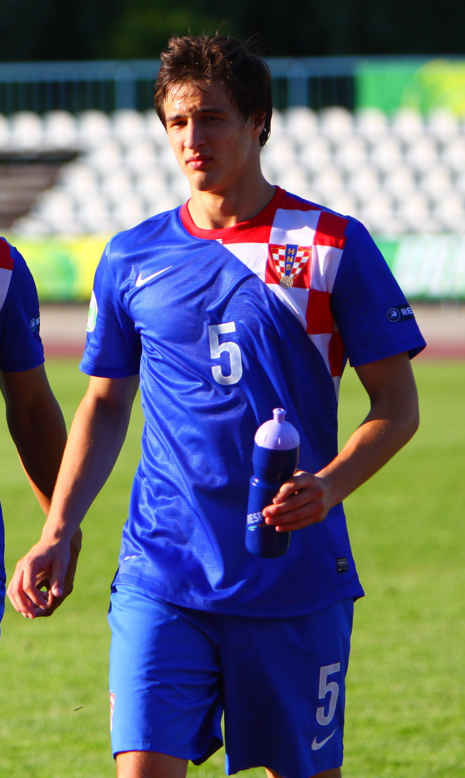 Toni Datković, Josip Čalušić, Matej Mitrović